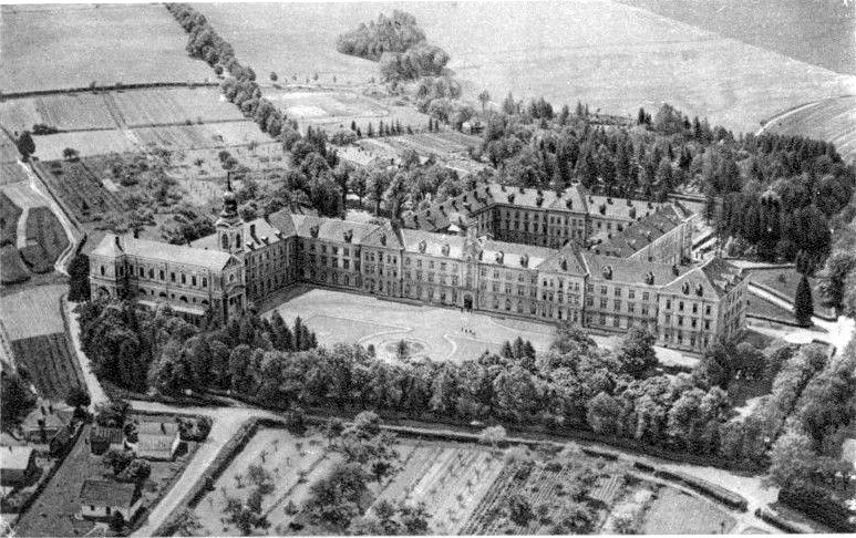 Chyrow - Collegium Jezuitow